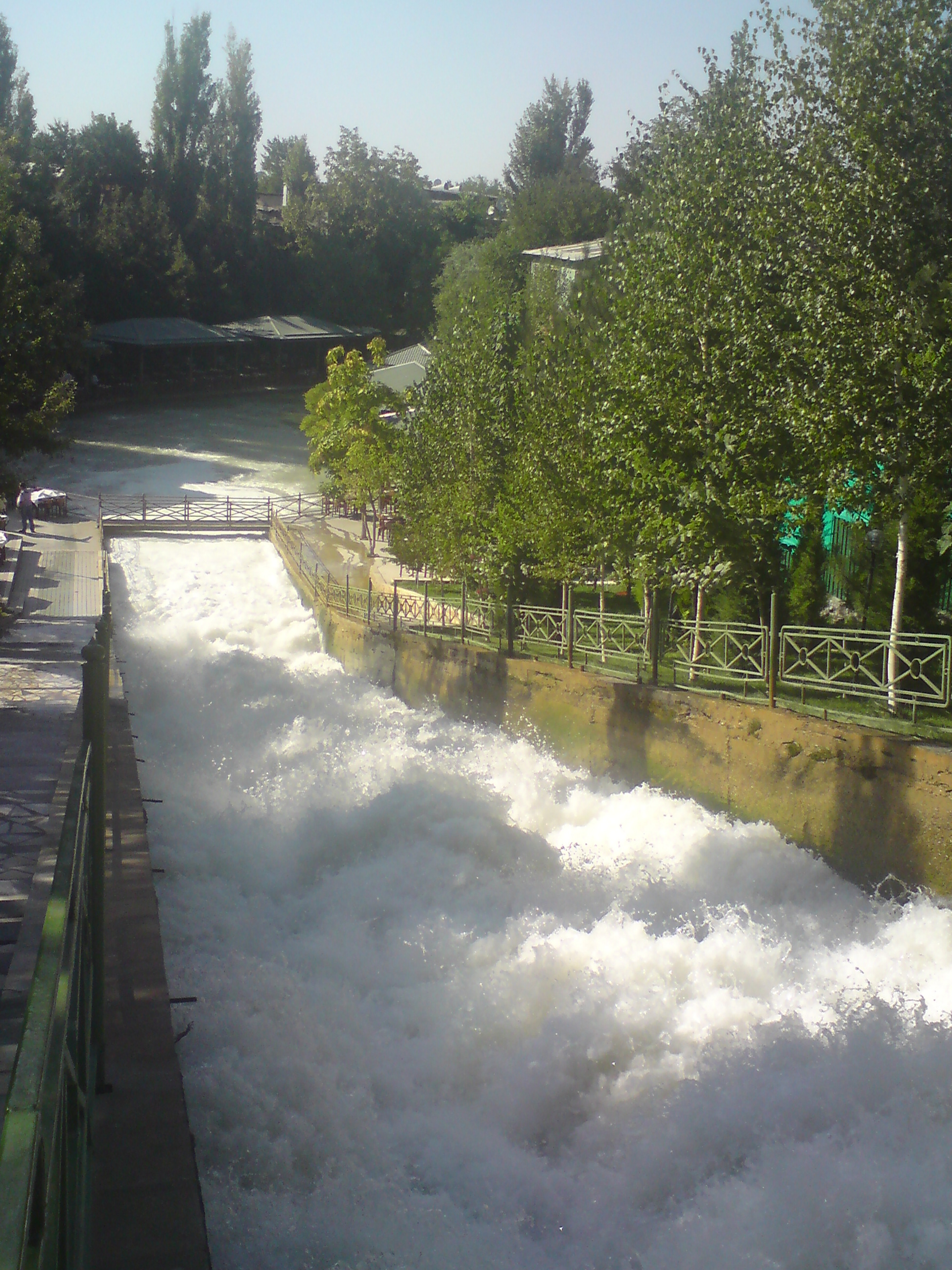 "Шаршара" (узб. "Водопад") на канале Кечкурук, город Ташкент, Узбекистан